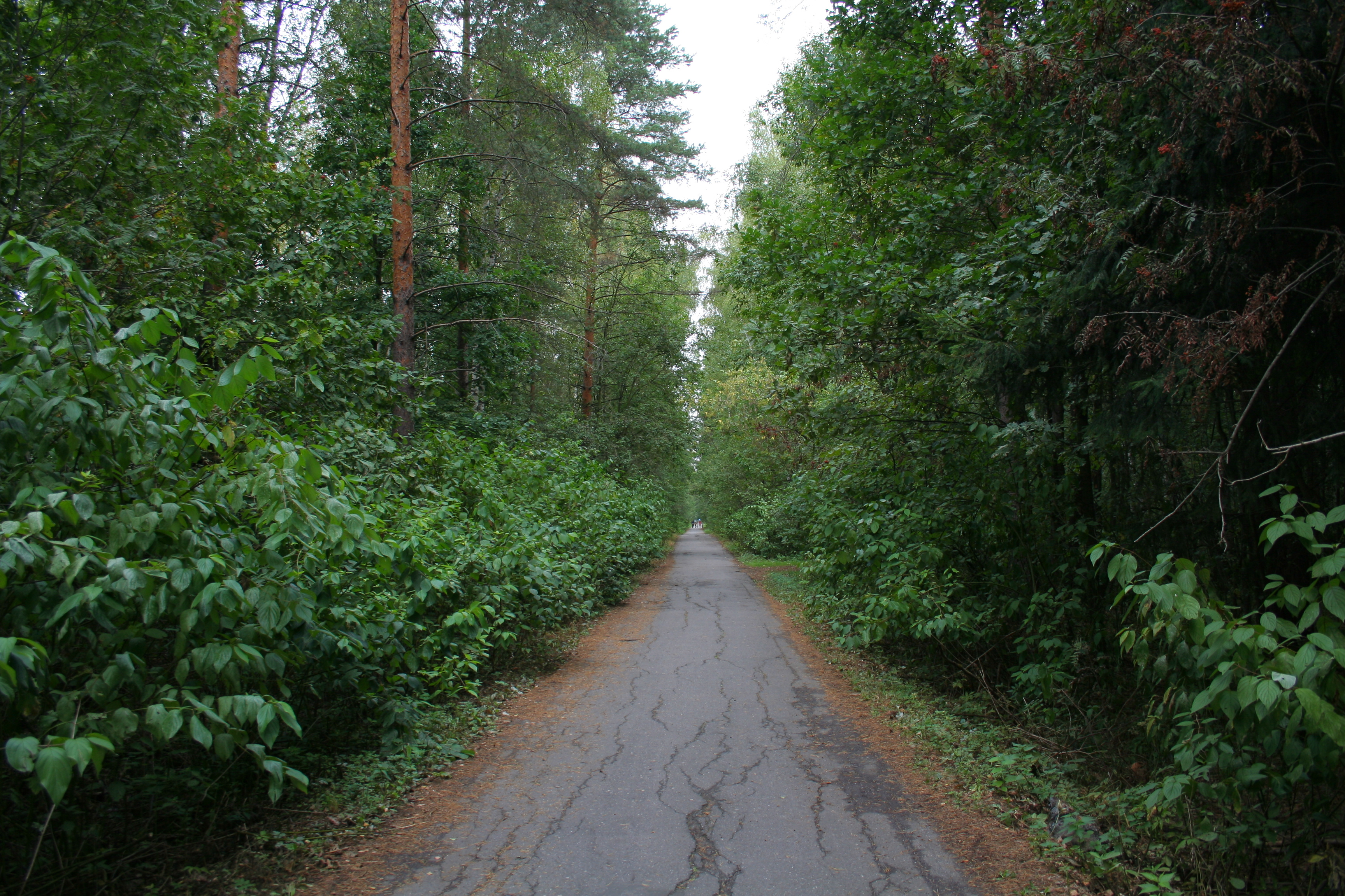 Национальный парк «Лосиный Остров» в Москве. Аллея, называемая на картах «Бумажной просекой». Вид в северную сторону.